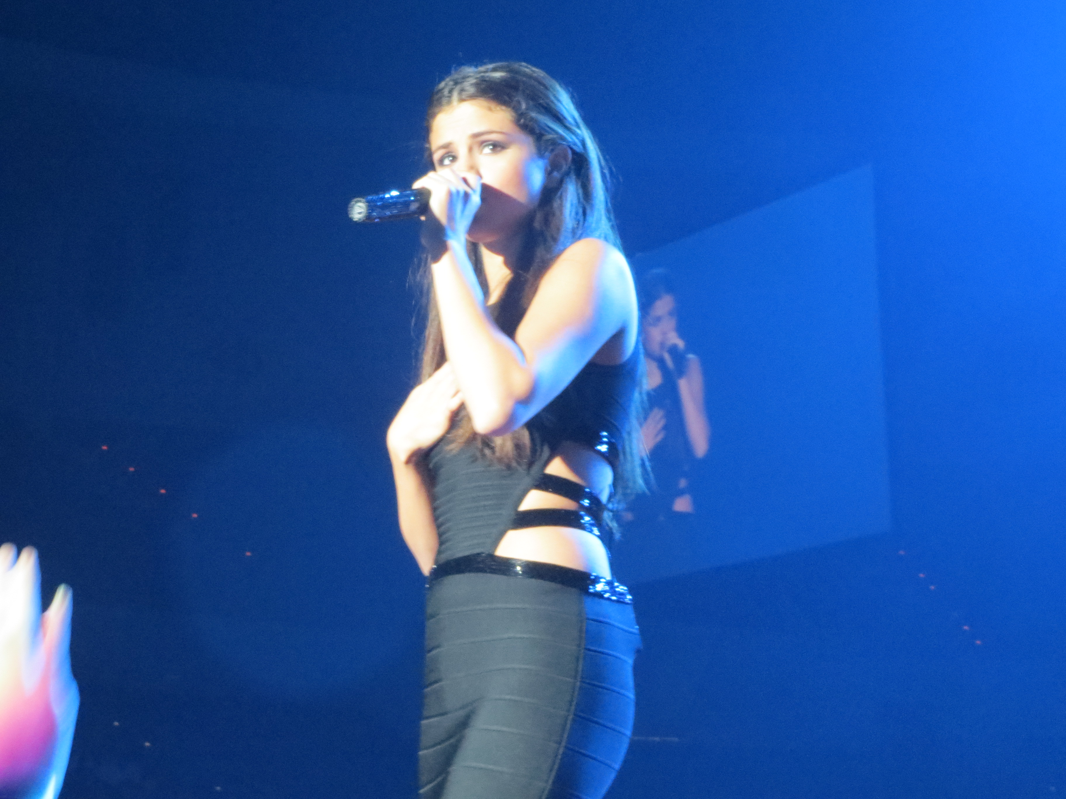 Selena Gomez StarsDance Nov 2013 San Diego, CA